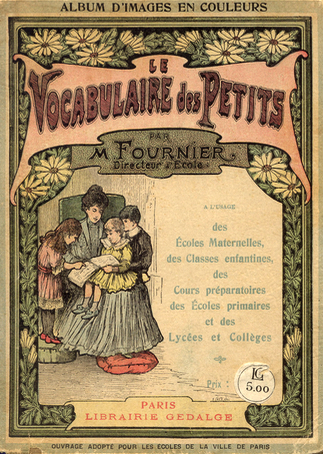 Mathieu Fournier, "Le vocabulaire des petits", manuel des écoles maternelles et des classes préparatoires, 1914-1927